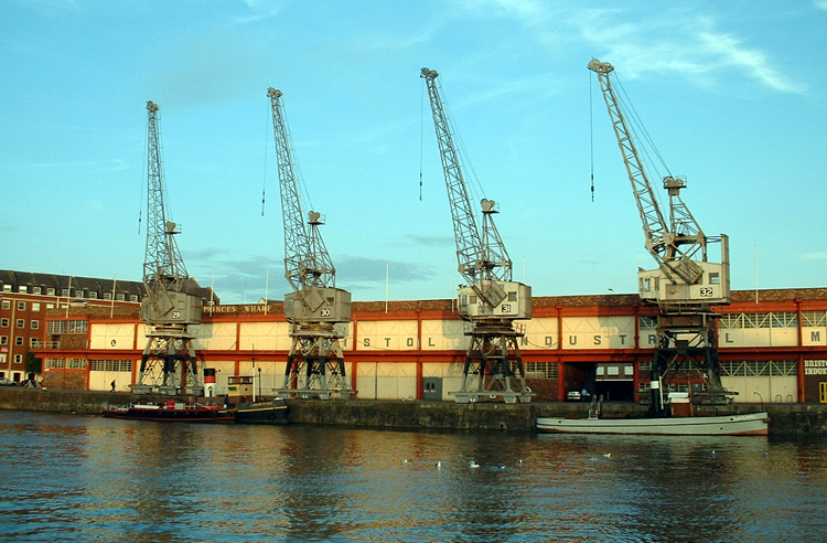 Bristol Industrial Museum